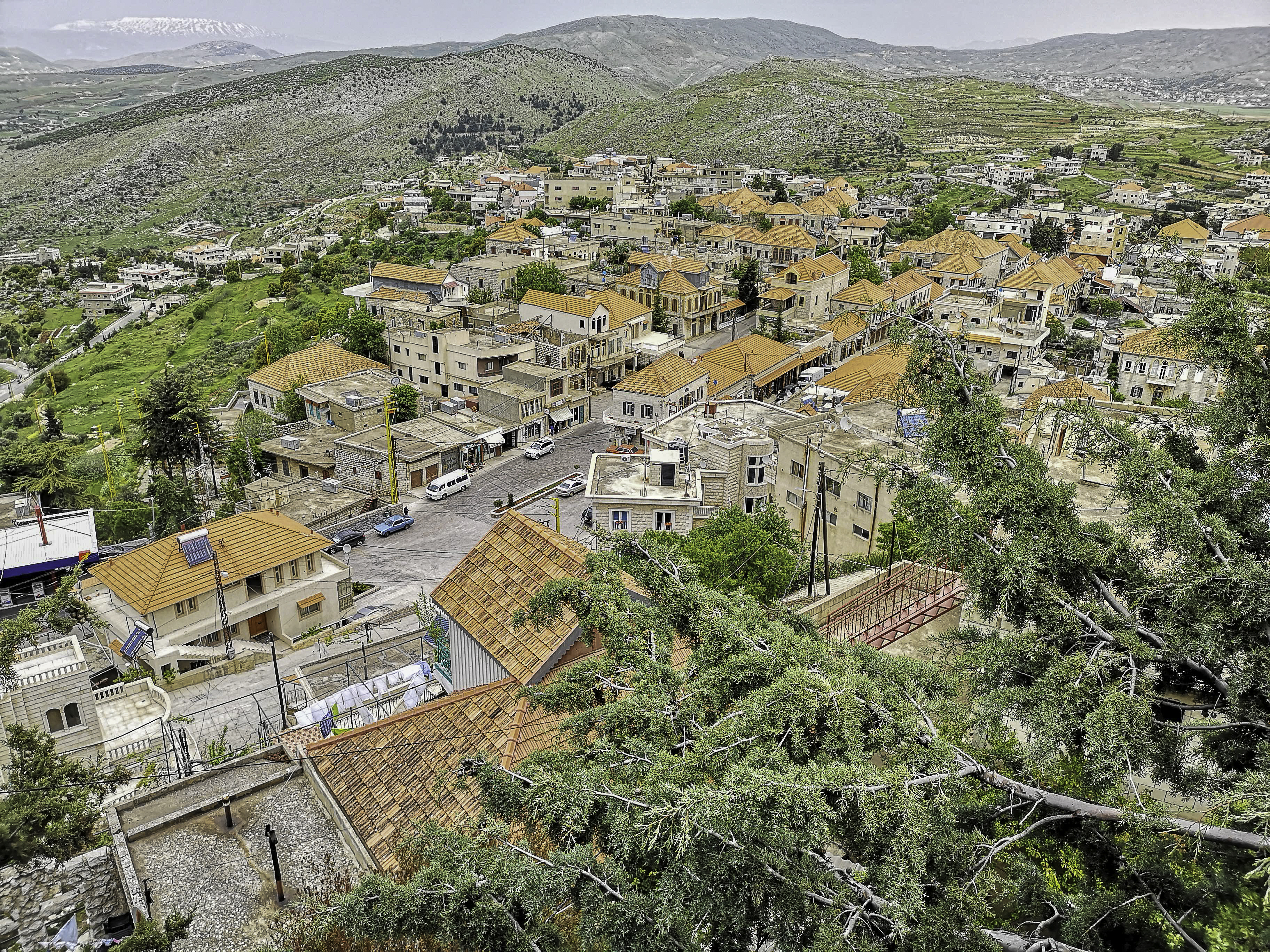 Het dorp Rashaya gezien vanaf de citadel